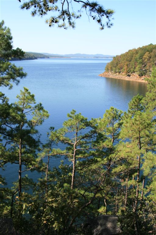 Taken by Daniel